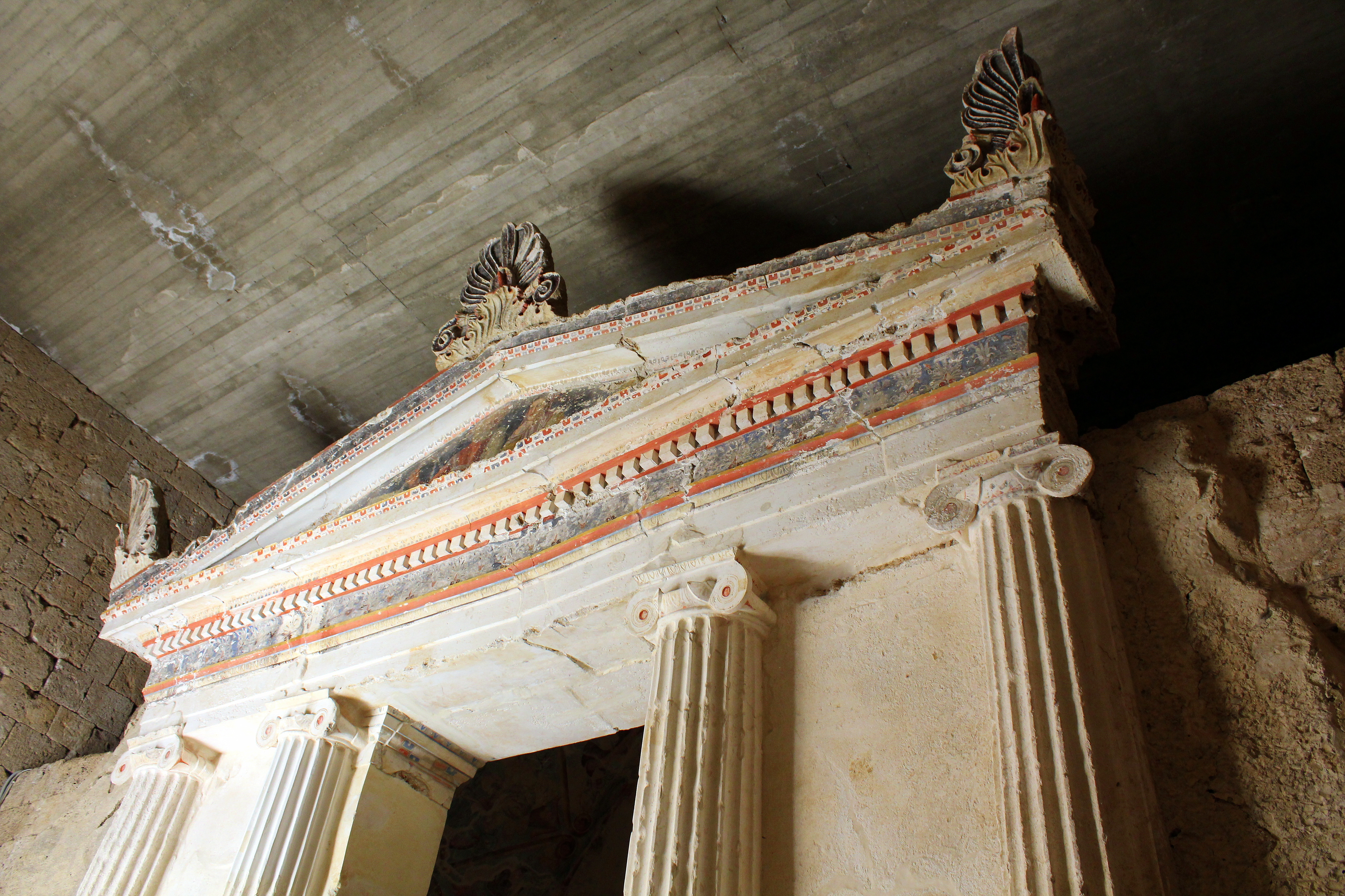 Μακεδονικός τάφος των Ανθεμίων«Μακεδονικός τάφος των Ανθεμίων»